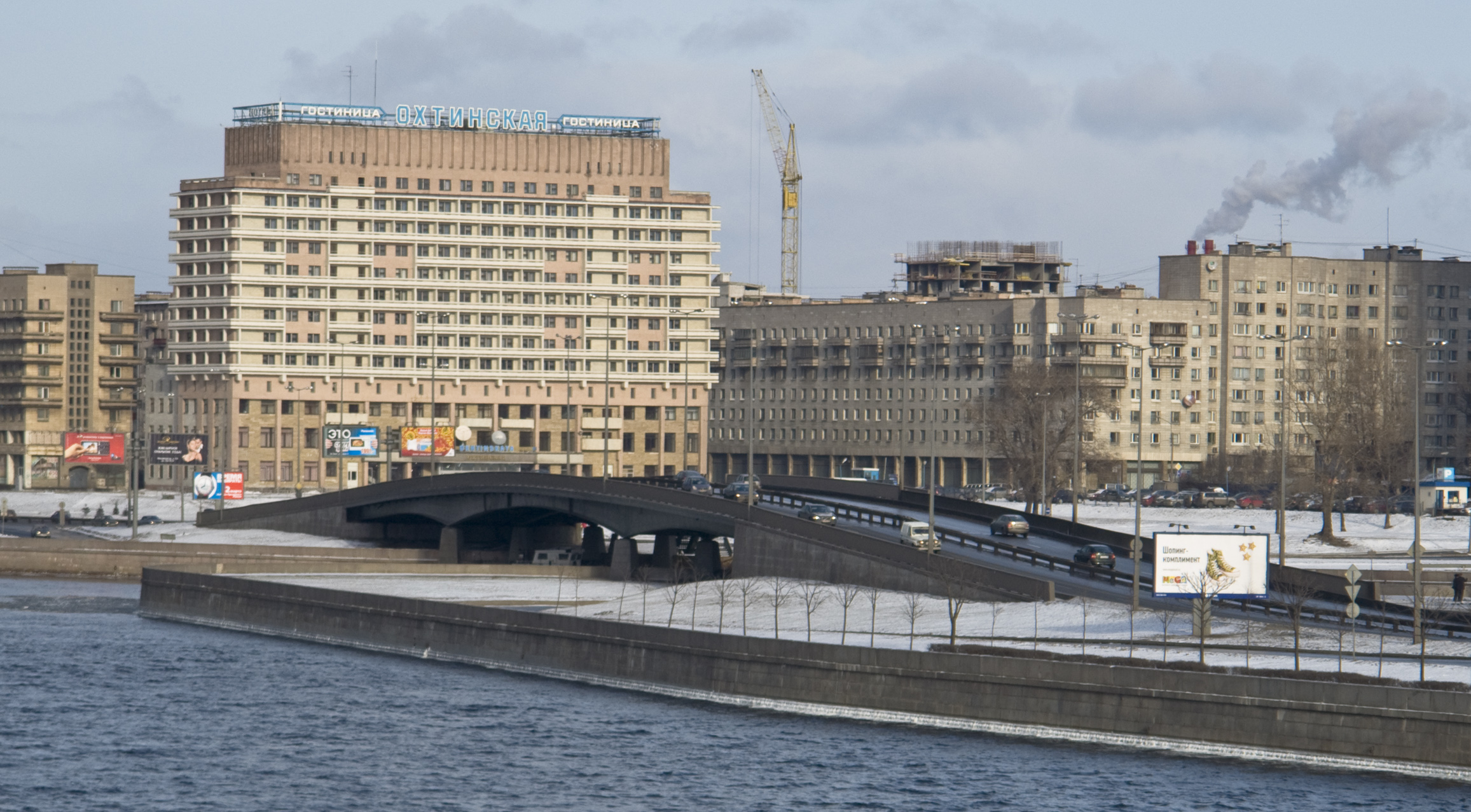 Малоохтинский мост (место слияния Невы и Большой Охты). Вид с моста Александра Невского, Санкт-Петербург.